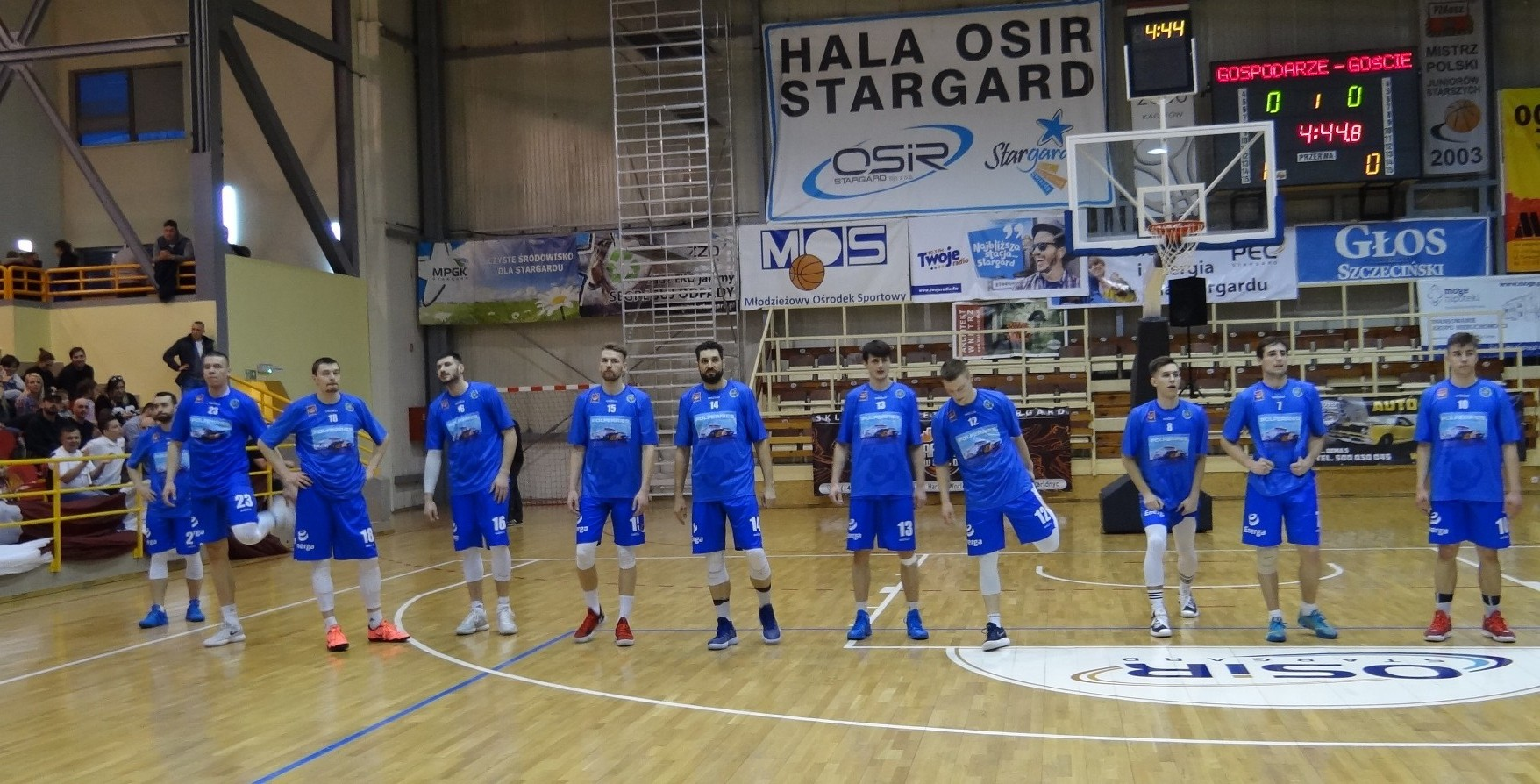 Energa Kotwica Kołobrzeg, 17.03.2017